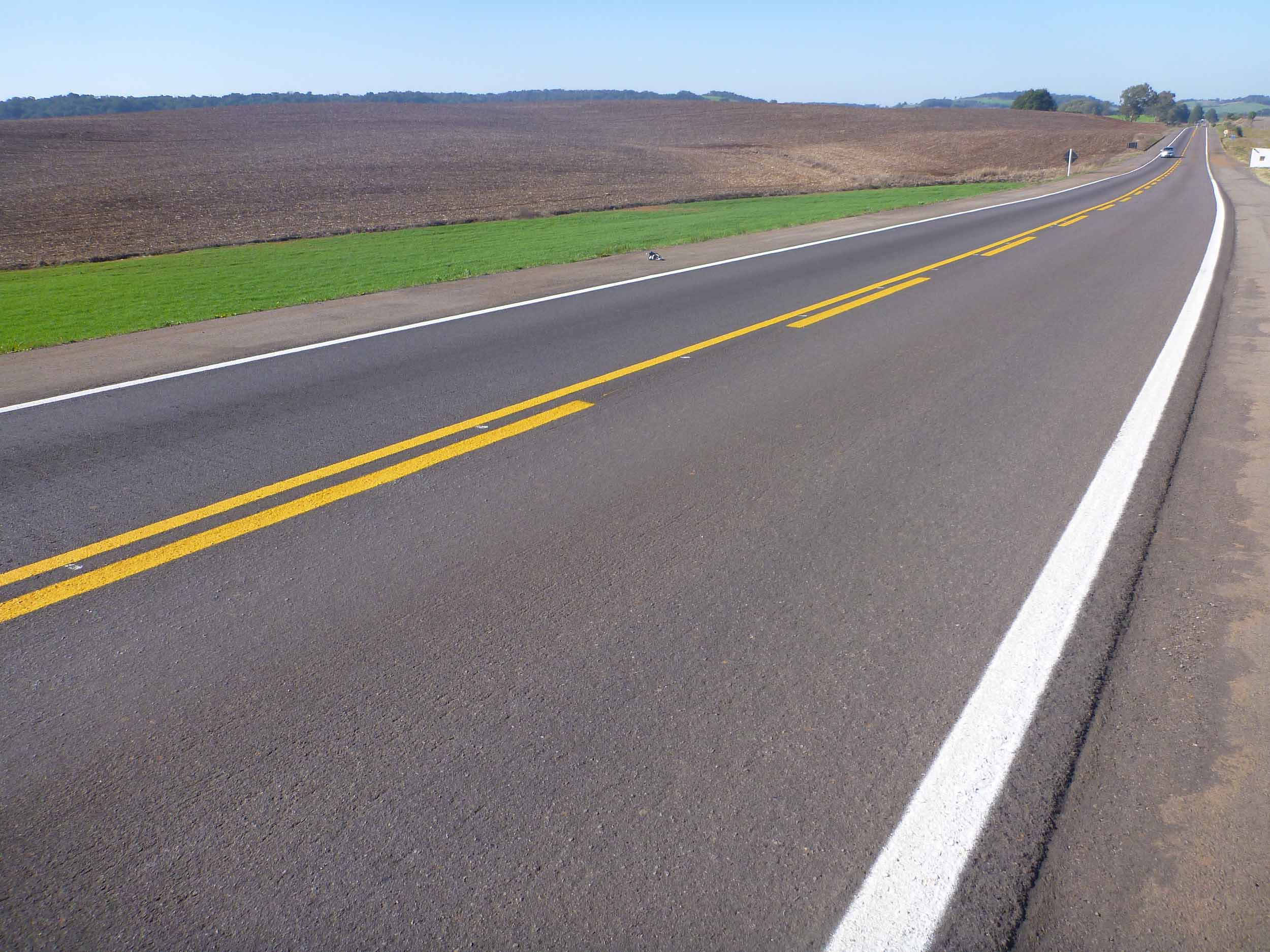 La carretera federal brasileña BR-285 en su paso por el estado de Rio Grande do Sul.